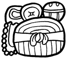 Majų glifas, simbolizuojantis miestą Tikal. Padarytas naudojant freeware Maya font.